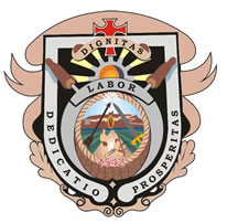 Actualmente es el Escudo Oficial de Jalpa. Palabras en Latín, "Labor", que significa trabajo, siguiéndole las palabras "Dedicatio" que significa dedicación y la palabra "Prosperitas" que significa prosperidad o progreso. "Dignitas" que significa dignidad o nobleza.